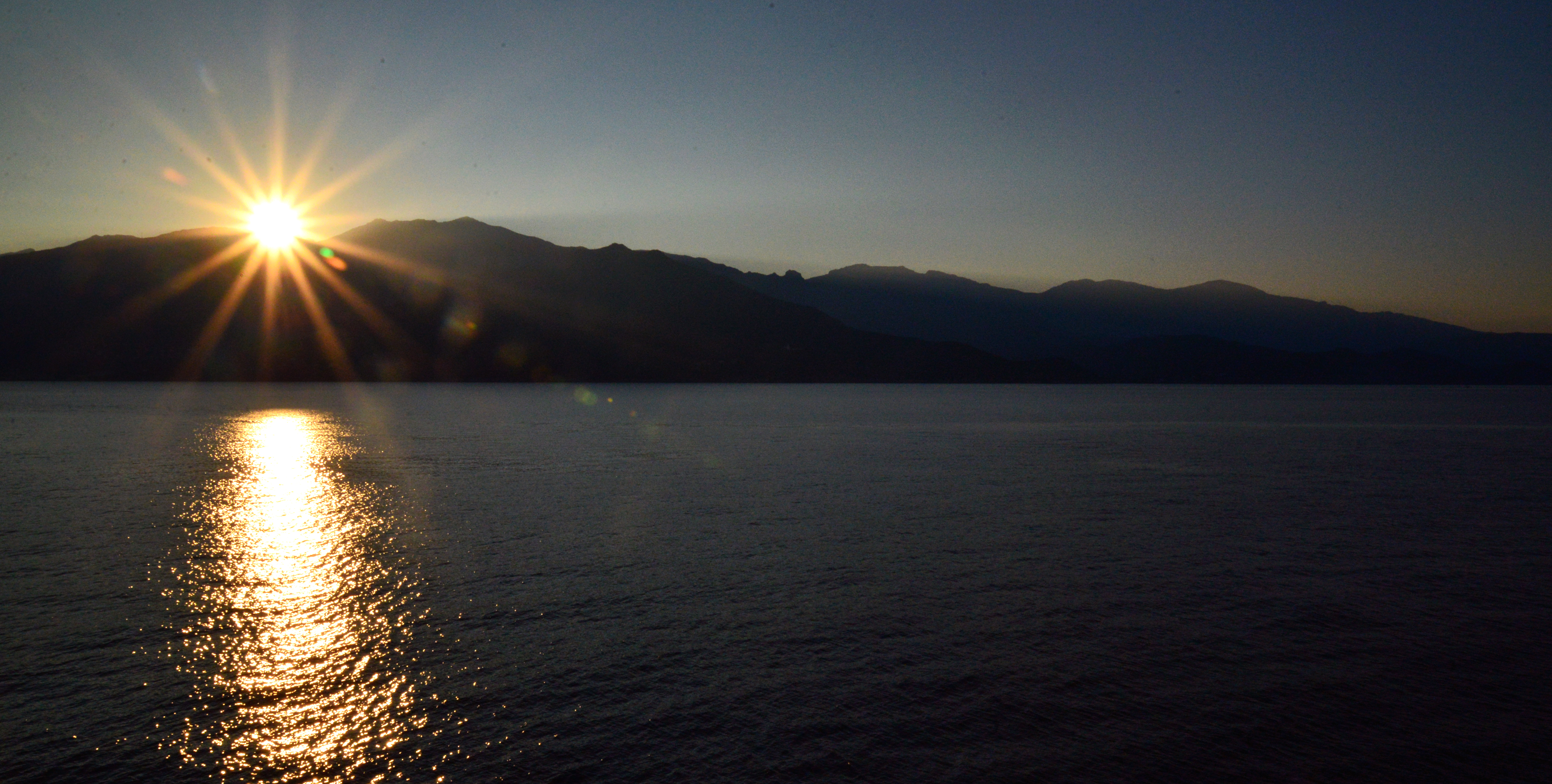 Cap Corse - Coucher de soleil sur le Monte Stello (1306m) de la chaîne de montagne de la Serra.